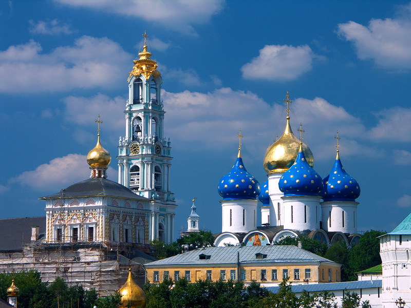 Ансамбль Троице-Сергиевской Лавры (Москва и Московская область, Сергиев Посад, Троице-Сергиева Лавра)